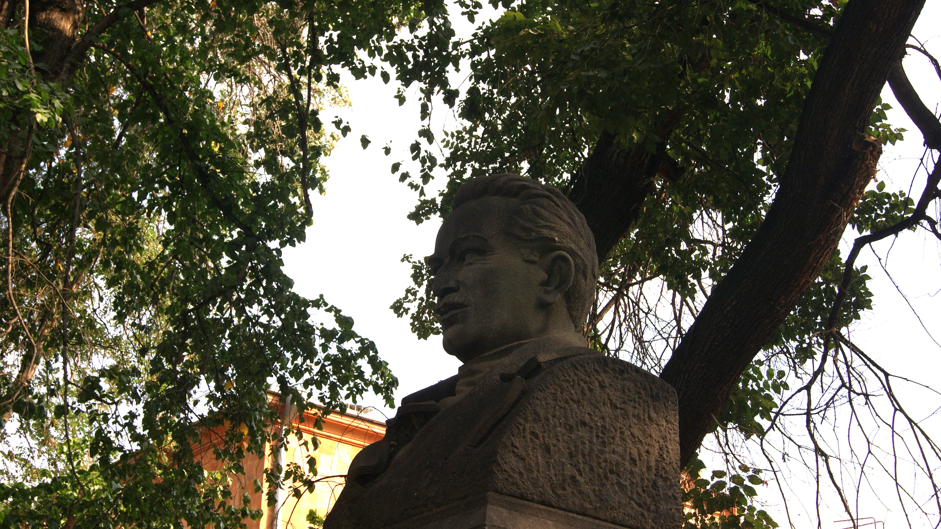 Անաստաս Միկոյանի հուշարձան, Վաղարշապատ 2/25